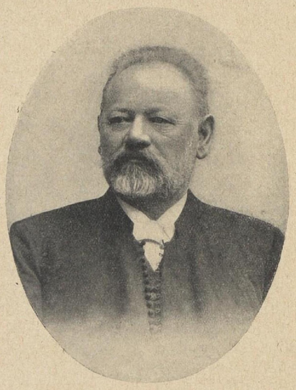 Stanislav Mayer (1841-1924), rakouský a český politik, dlouholetý starosta Horažďovic